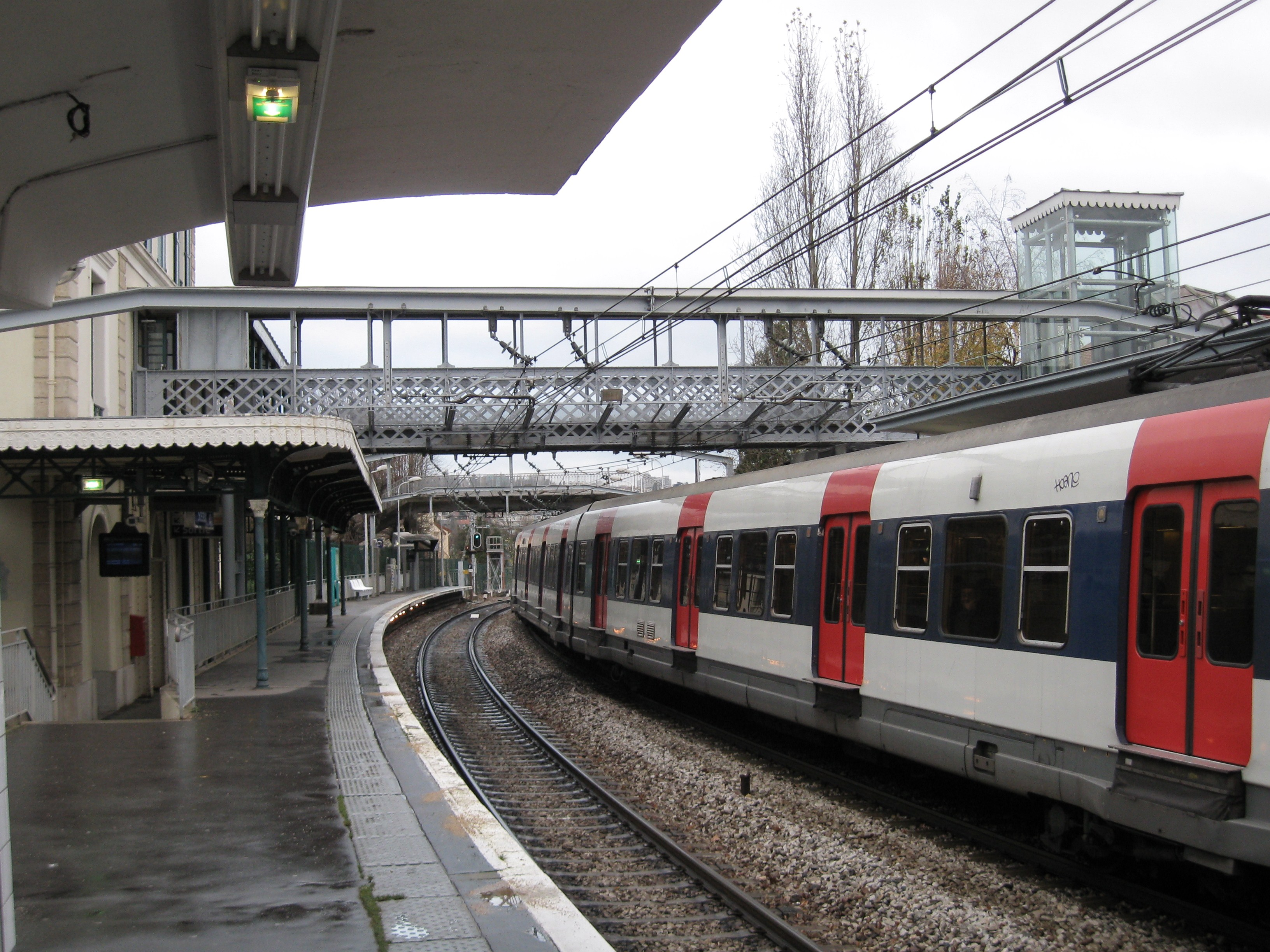 Gare de Sceaux, rame MI 79 à l'arrêt en provenance de Robinson, Sceaux, Hauts-de-Seine, France